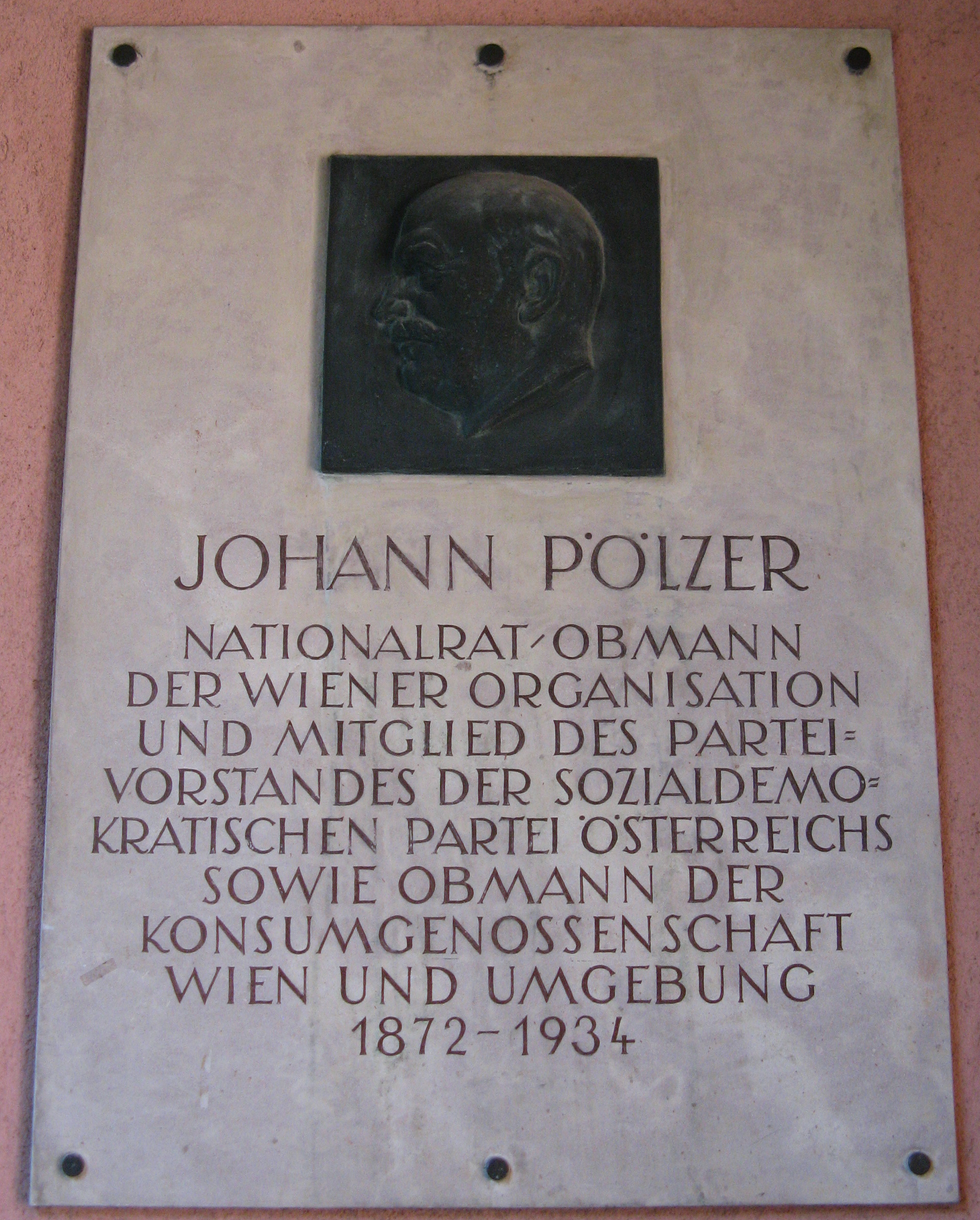 Gedenktafel für Johann Pölzer, Pölzerhof, Dampfgasse 35-37, Wien-Favoriten